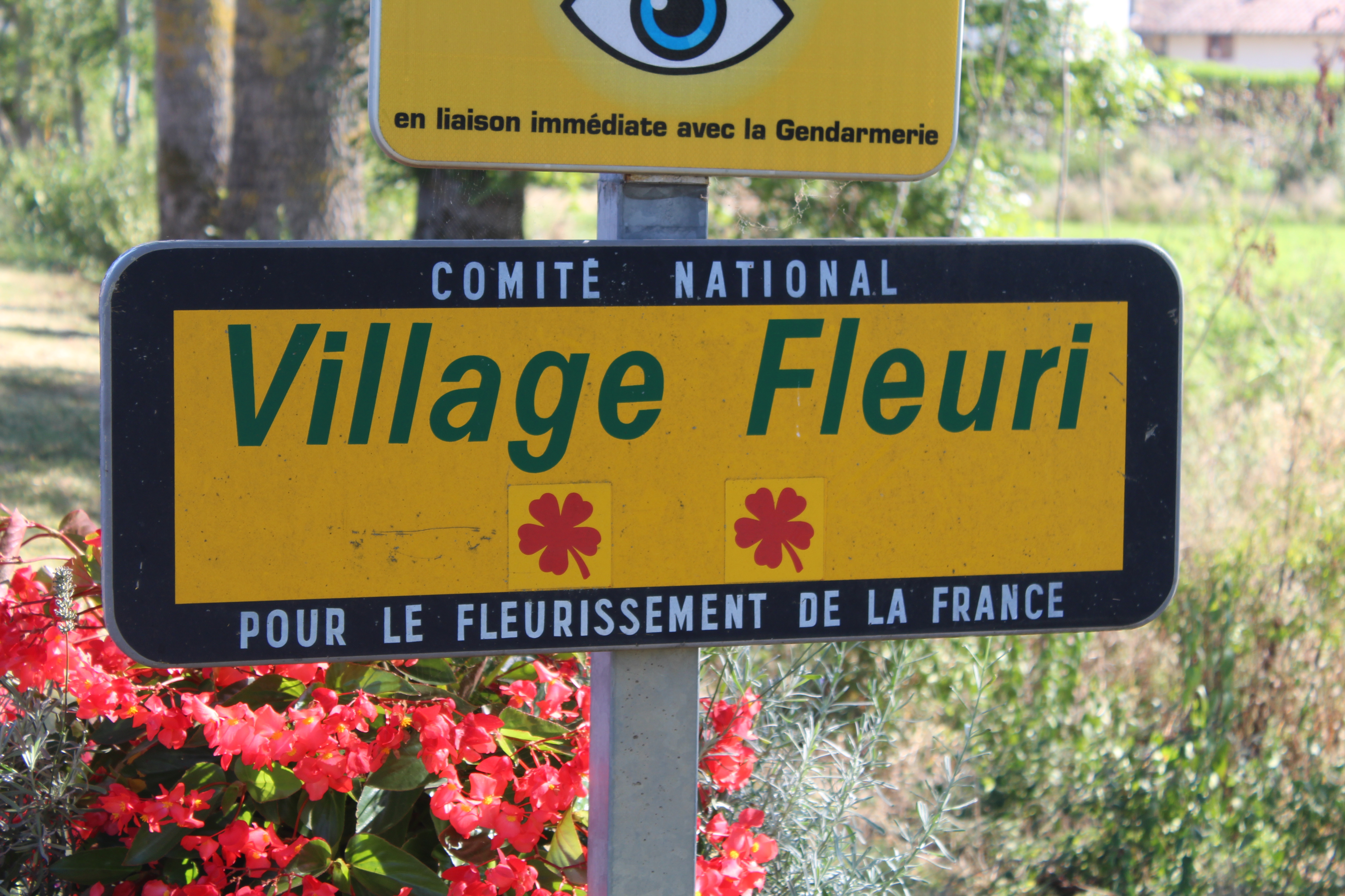 Panneaux Village Fleuri avec 2 fleurs à Saint-Didier-d'Aussiat.